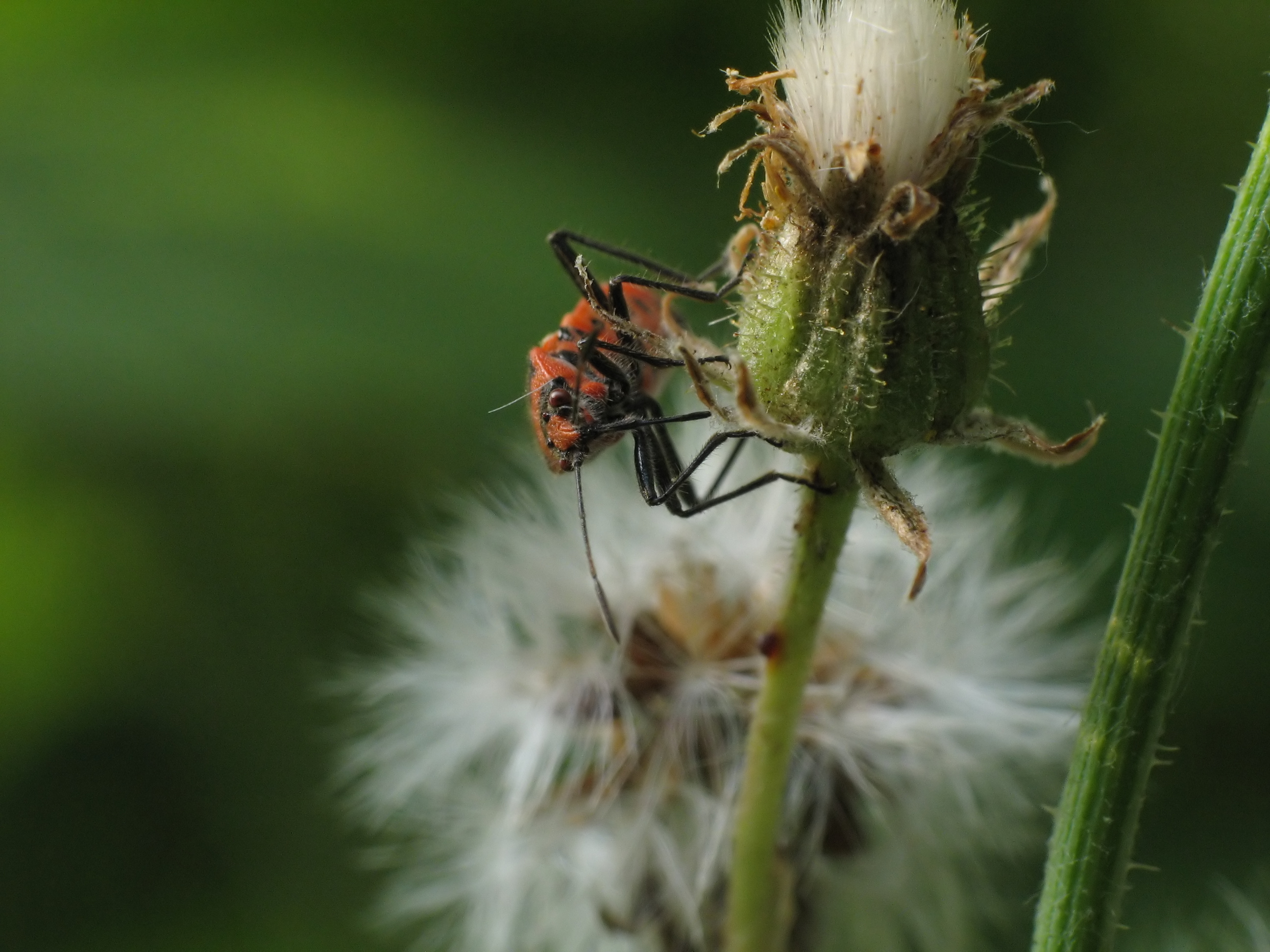 Glinik lulkarz (Corizus hyoscyami L.)